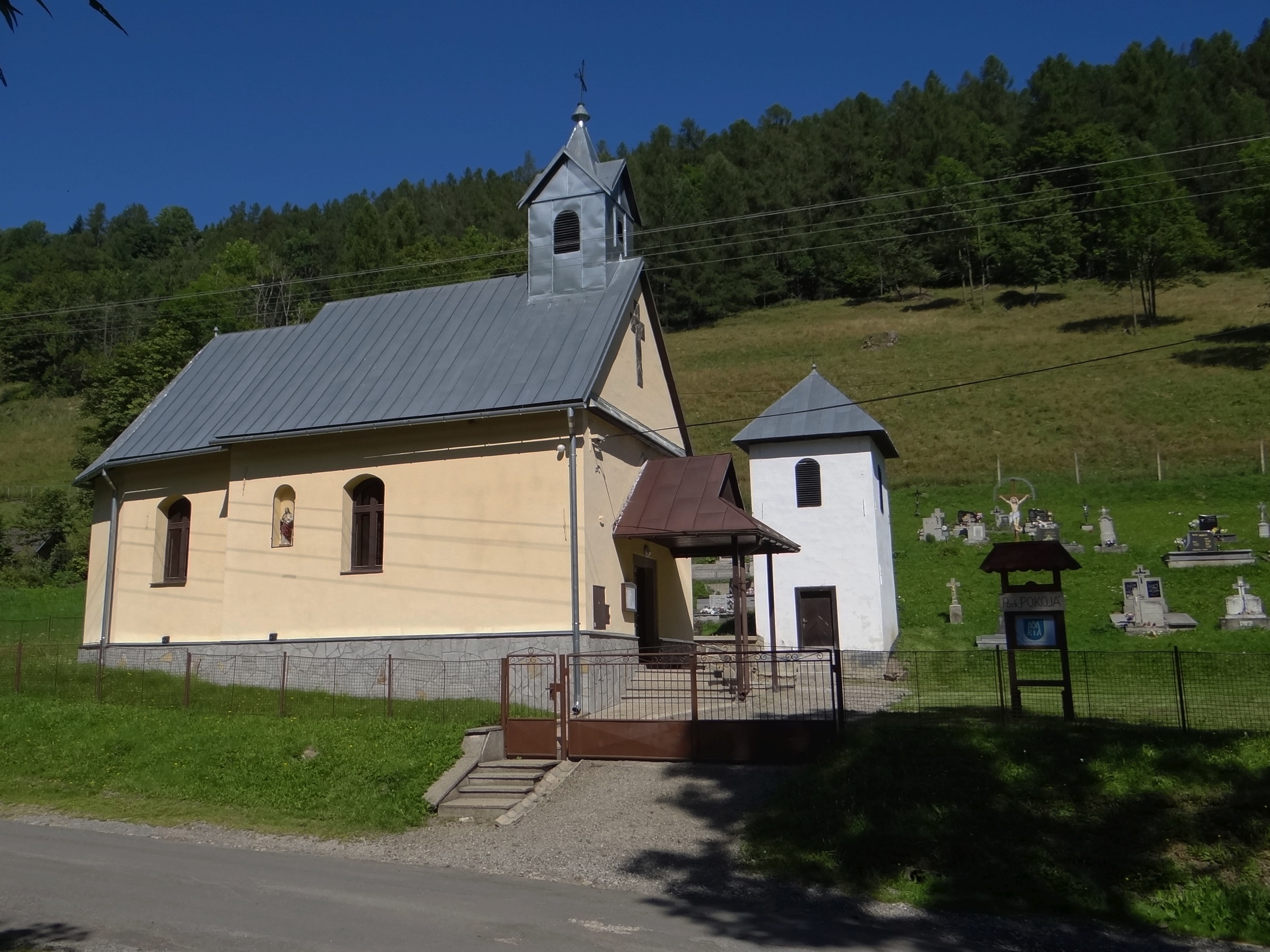 Jezersko